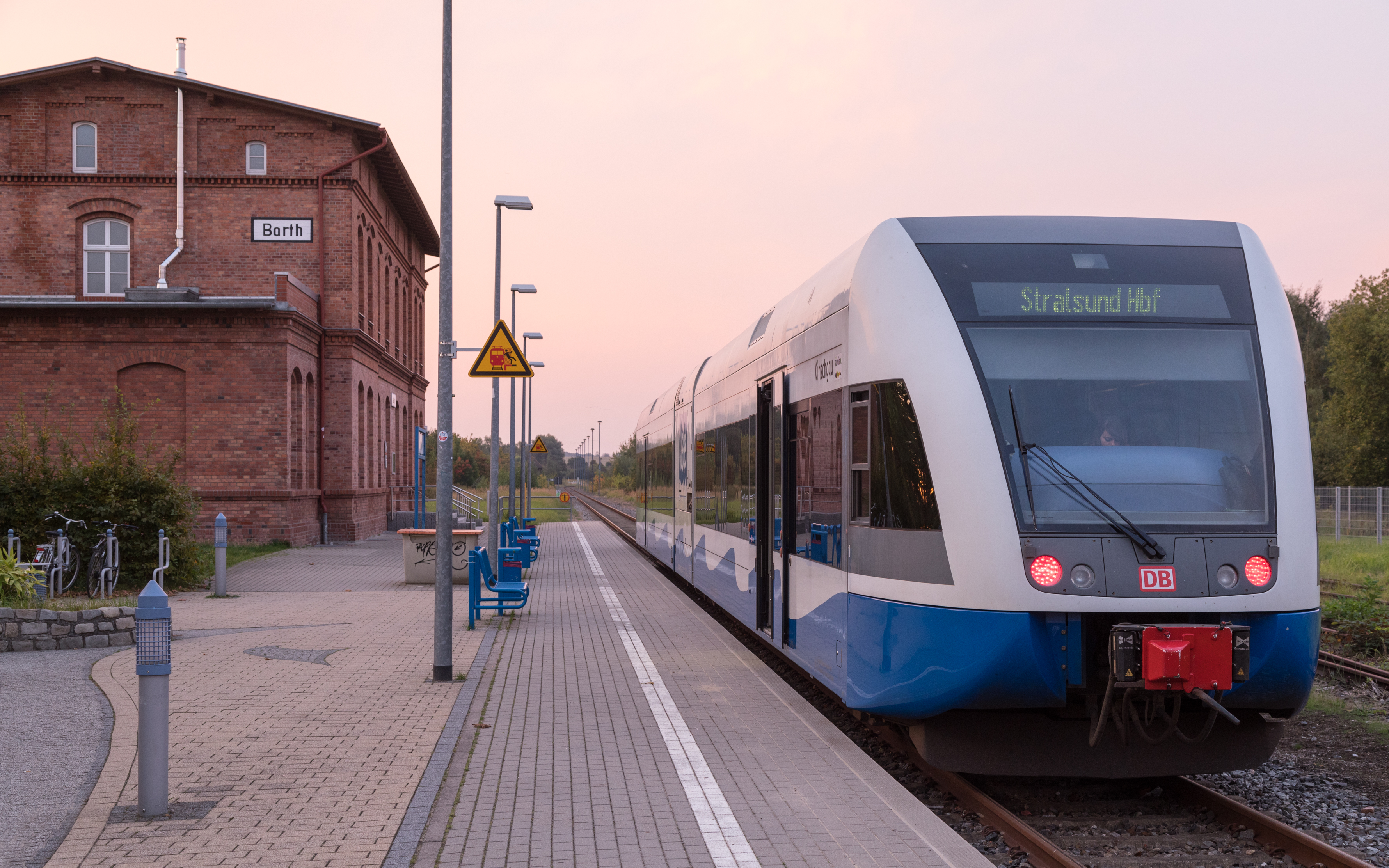 Stadler GTW 2-6 (bzw. BR 646) der Usedomer Bäderbahn UBB im Bahnhof Barth (2017)